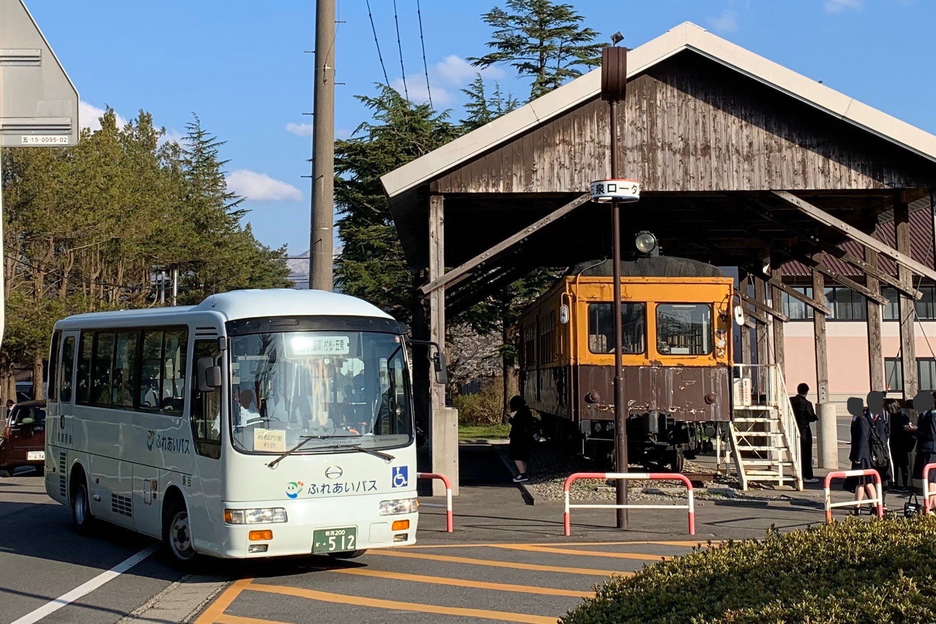 蒲原鉄道が運行する五泉市ふれあいバス（2020年4月）